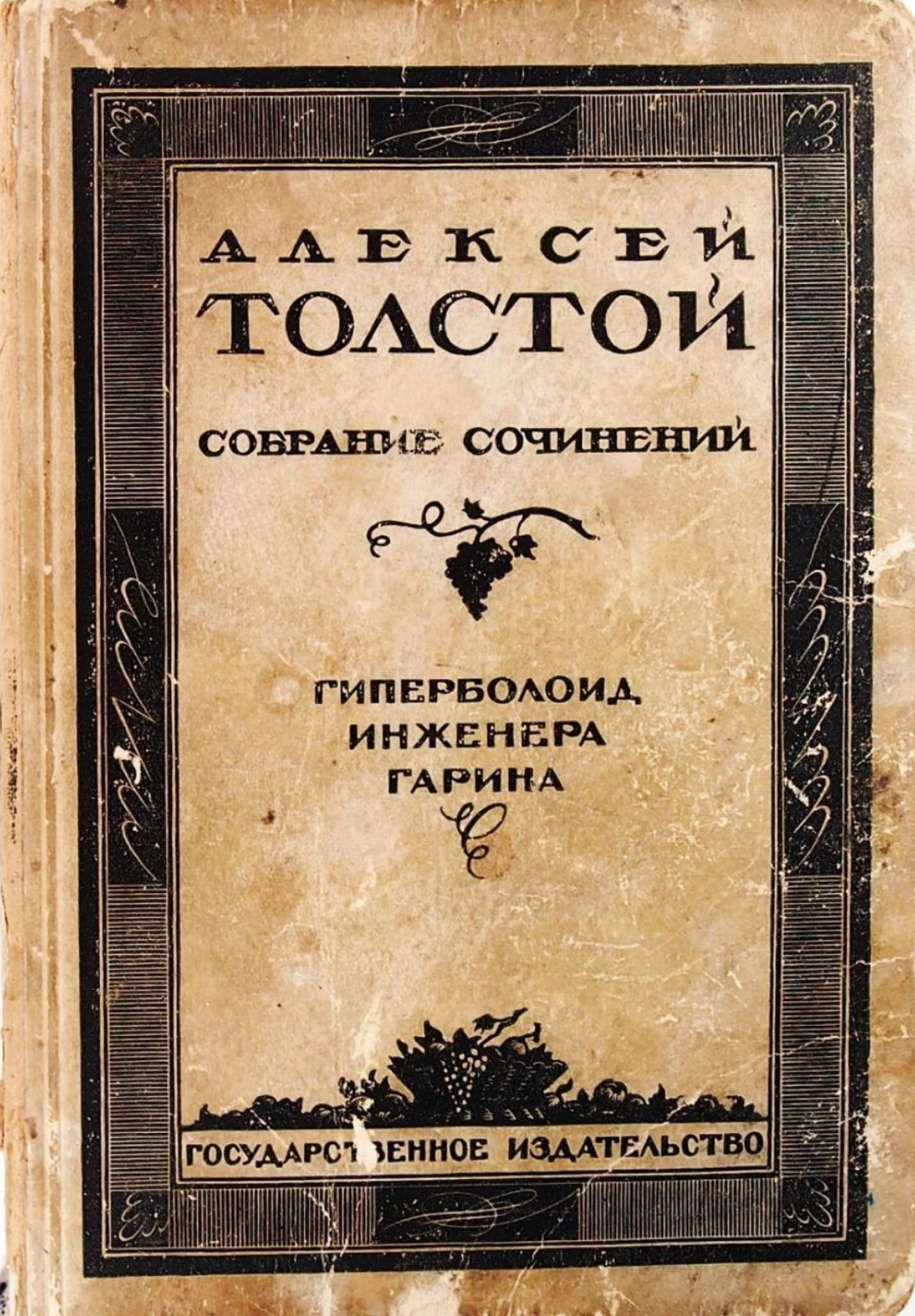 Обложка книги "Гиперболоид инженера Гарина". 1 издание, издательство Госиздат 1927